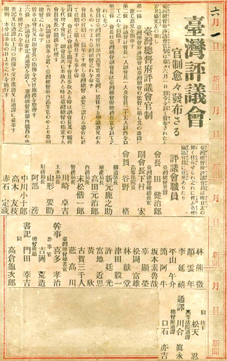 中文（台灣）: 臺灣總督府評議會官制組成，1921年6月1日公布。